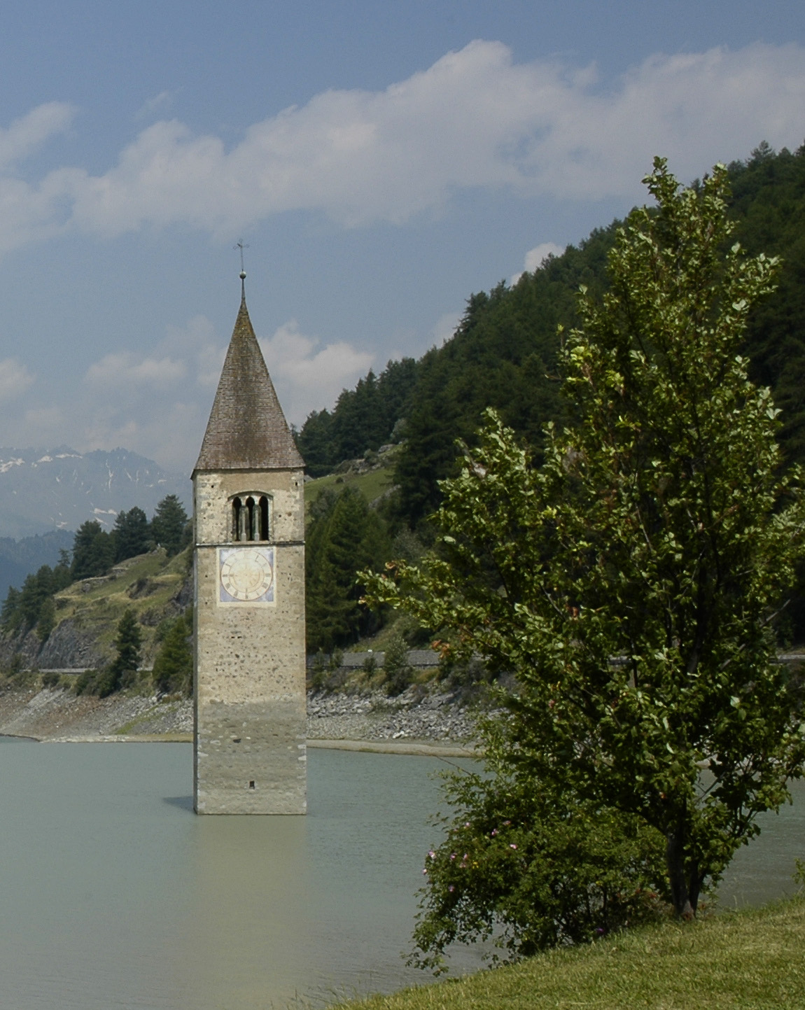 resia lac cloche